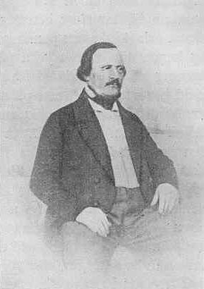 The Finnish scientist Erik Alexander Ingman (1810-1858).